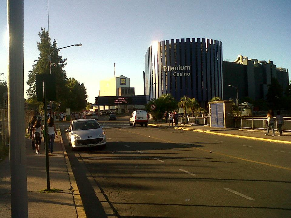 Edificio del casino Trillenium en Tigre, Provincia de Buenos Aires